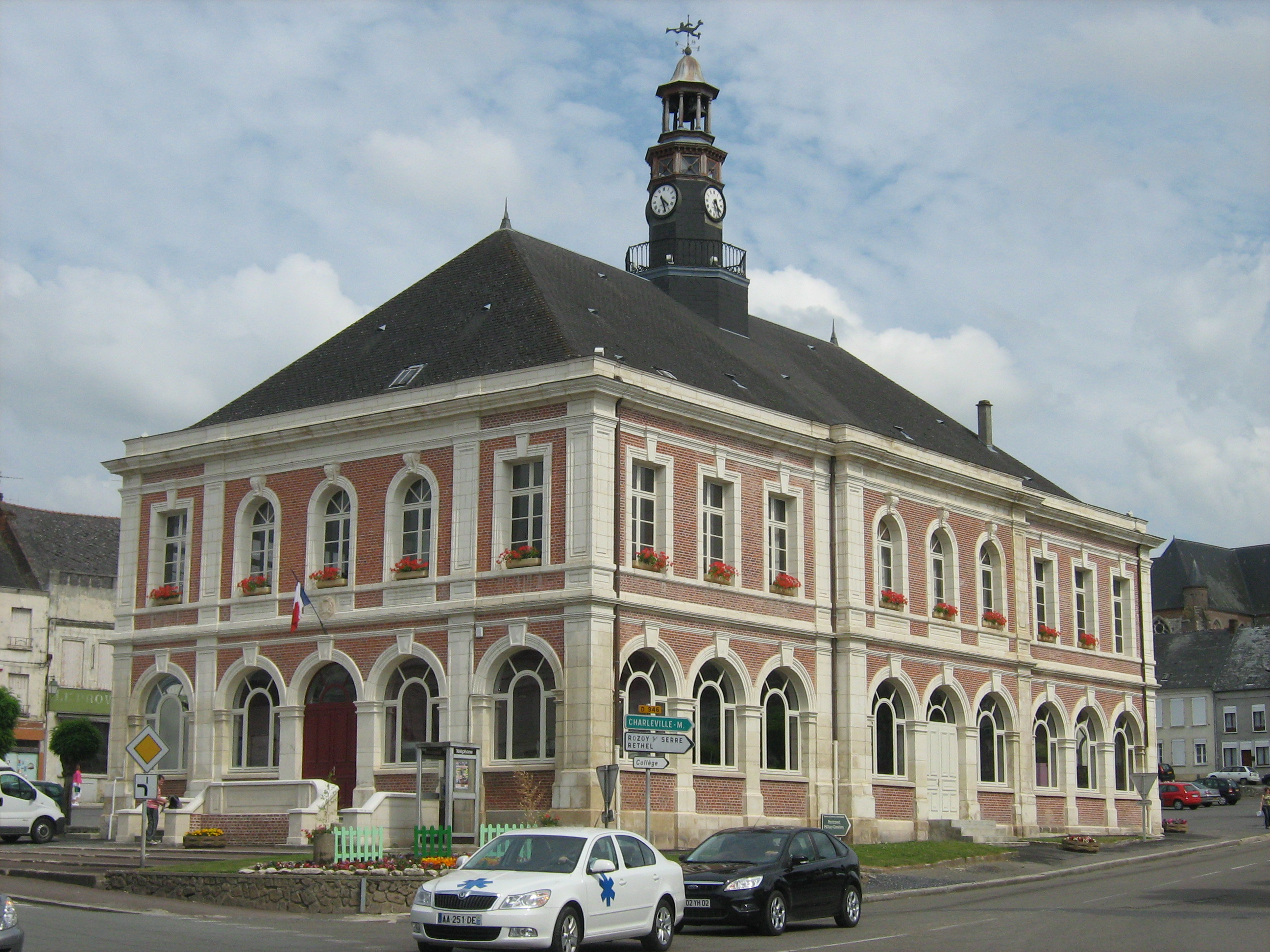 Mairie de Moncornet.